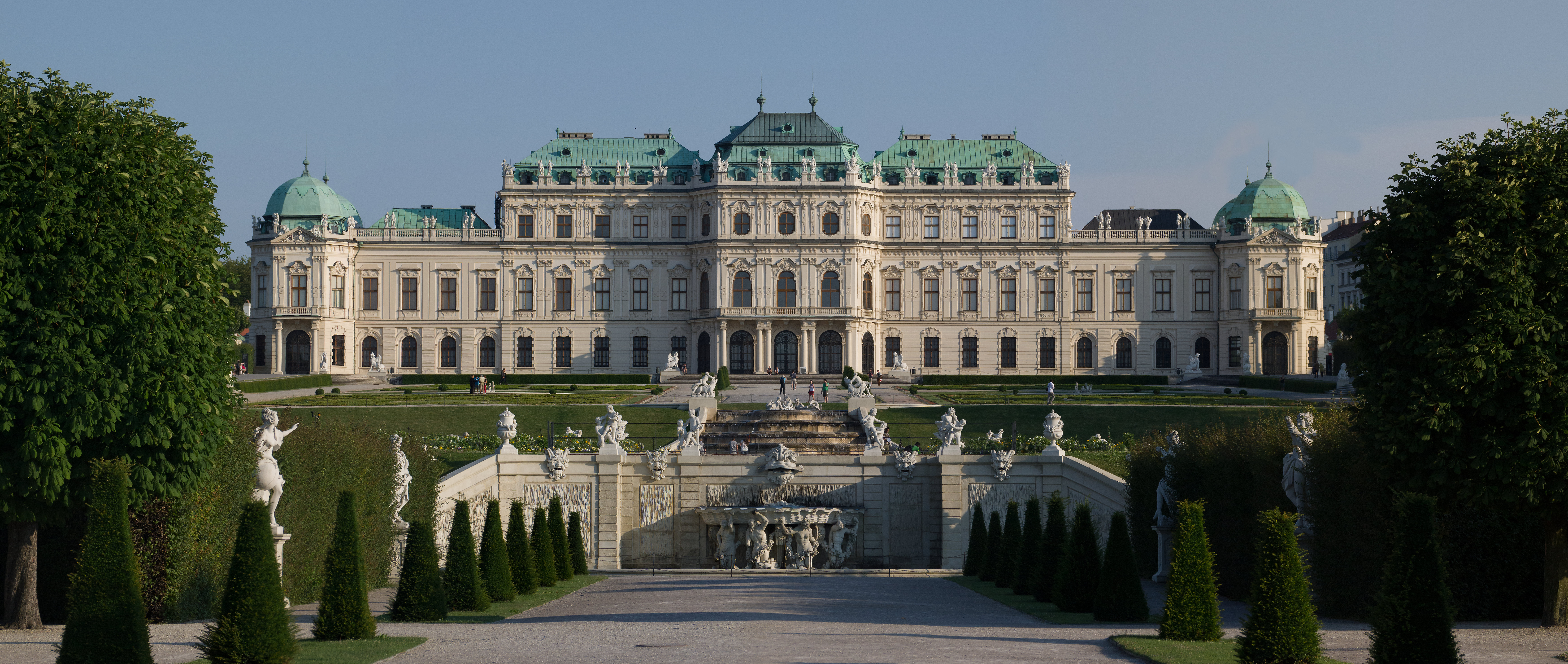 Schloss Belvedere samt Schlosspark mit Baulichkeiten